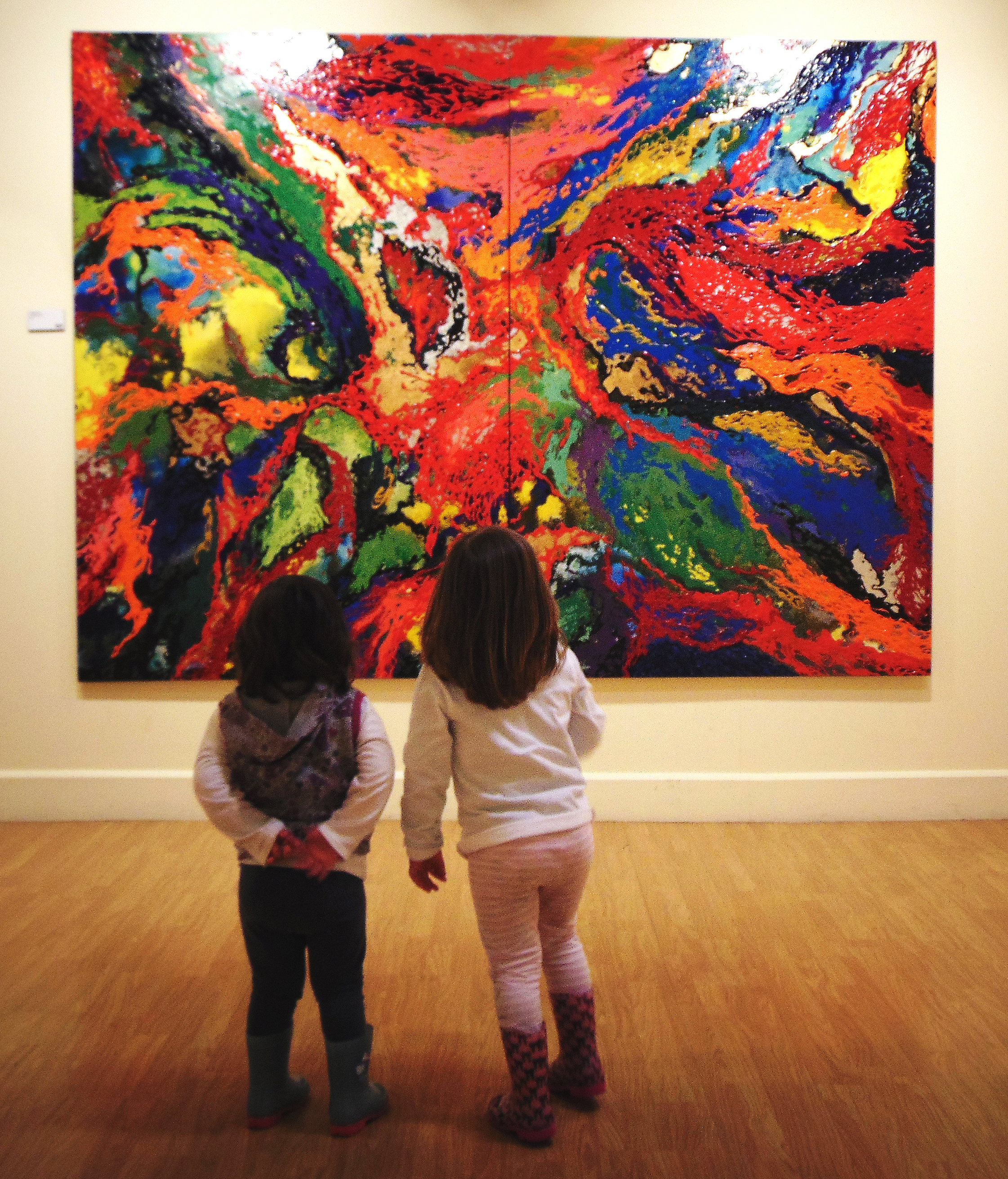 Niñas frente a la obra YellowStone